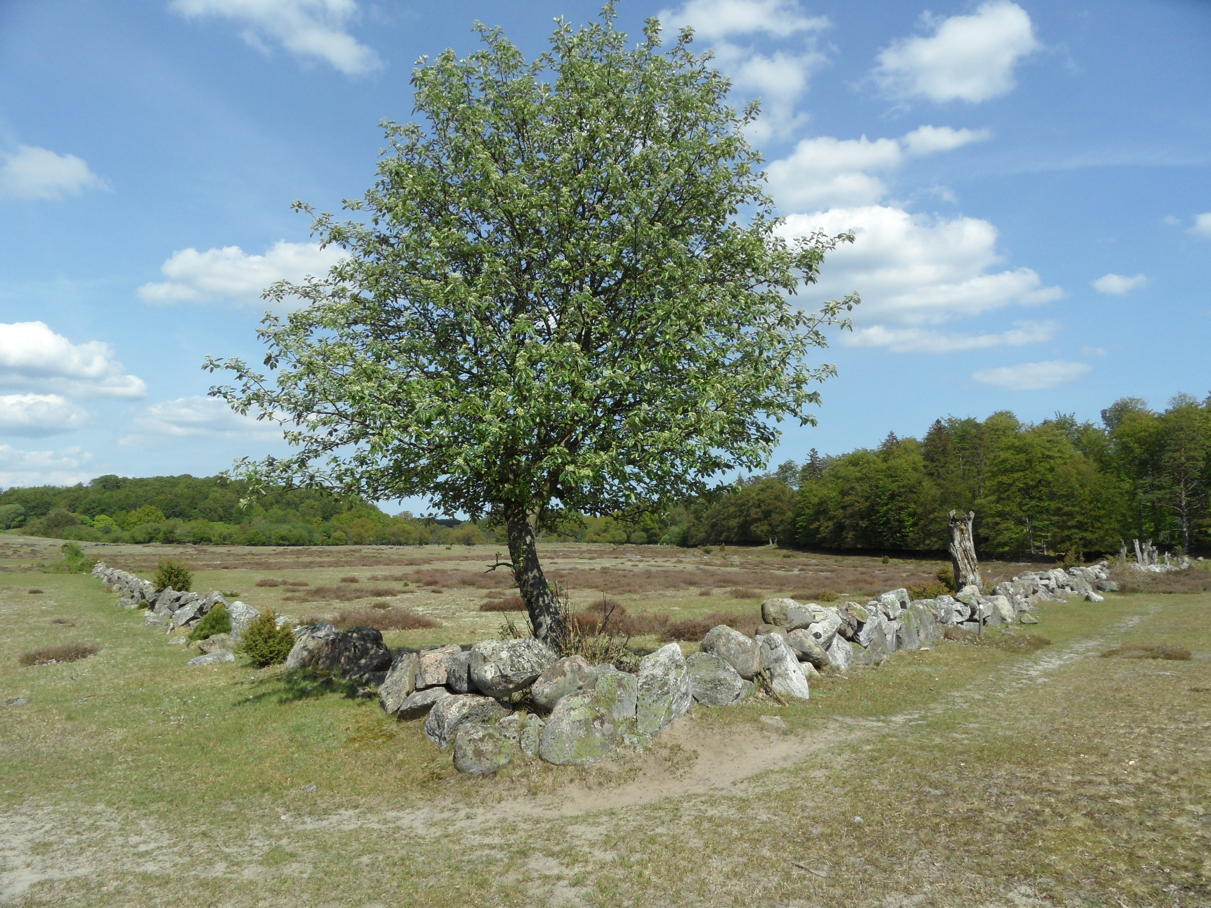 En ensam oxel (Sorbus intermedia) vid hörnet av ett stengärde i Drakamöllan naturreservat, Tommelilla kommun, Skåne, Sverige.